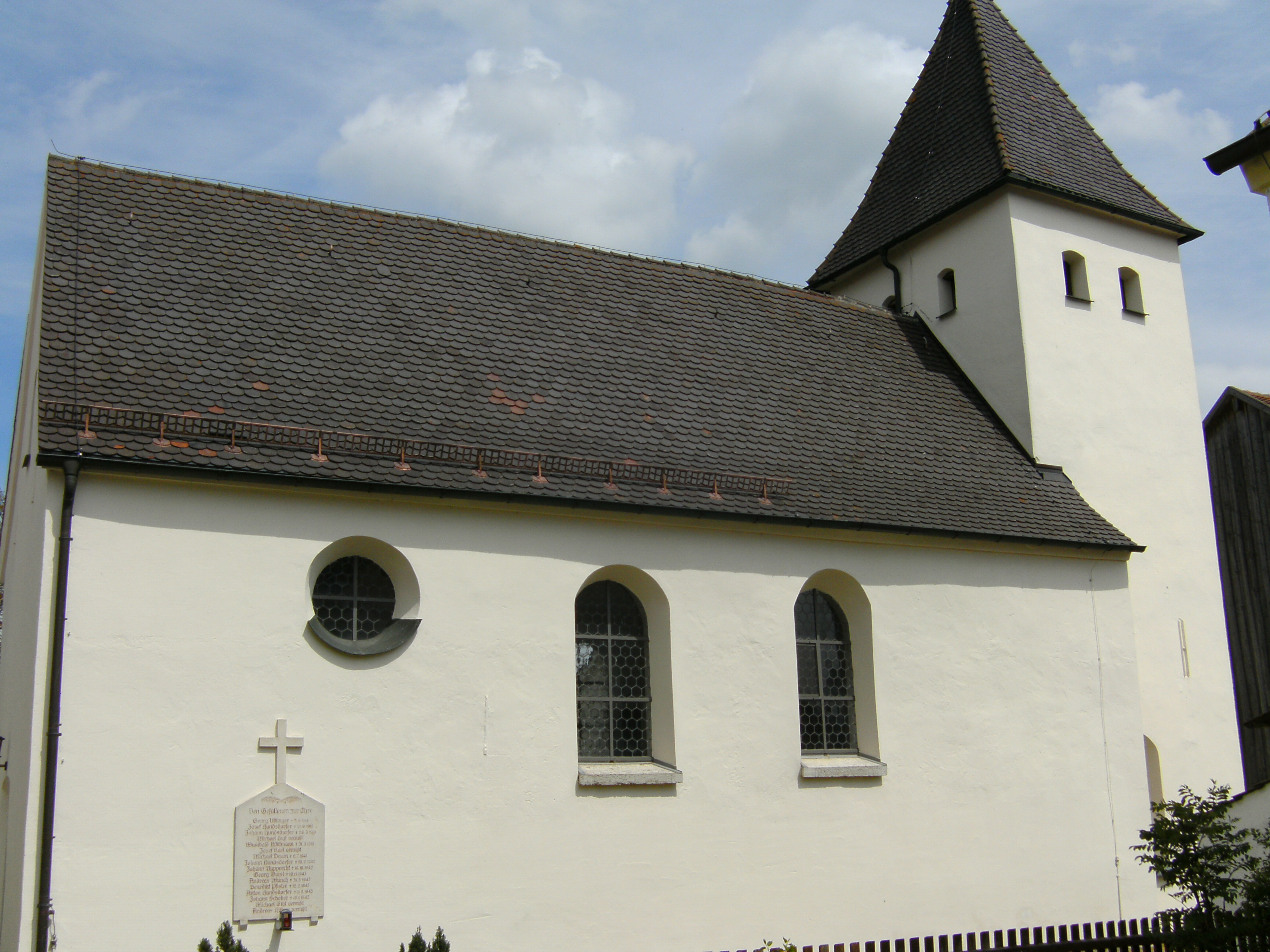 Kirche St. Nikolaus in Amtmannsdorf im Landkreis Eichstätt, Regierungsbezirk Oberbayern